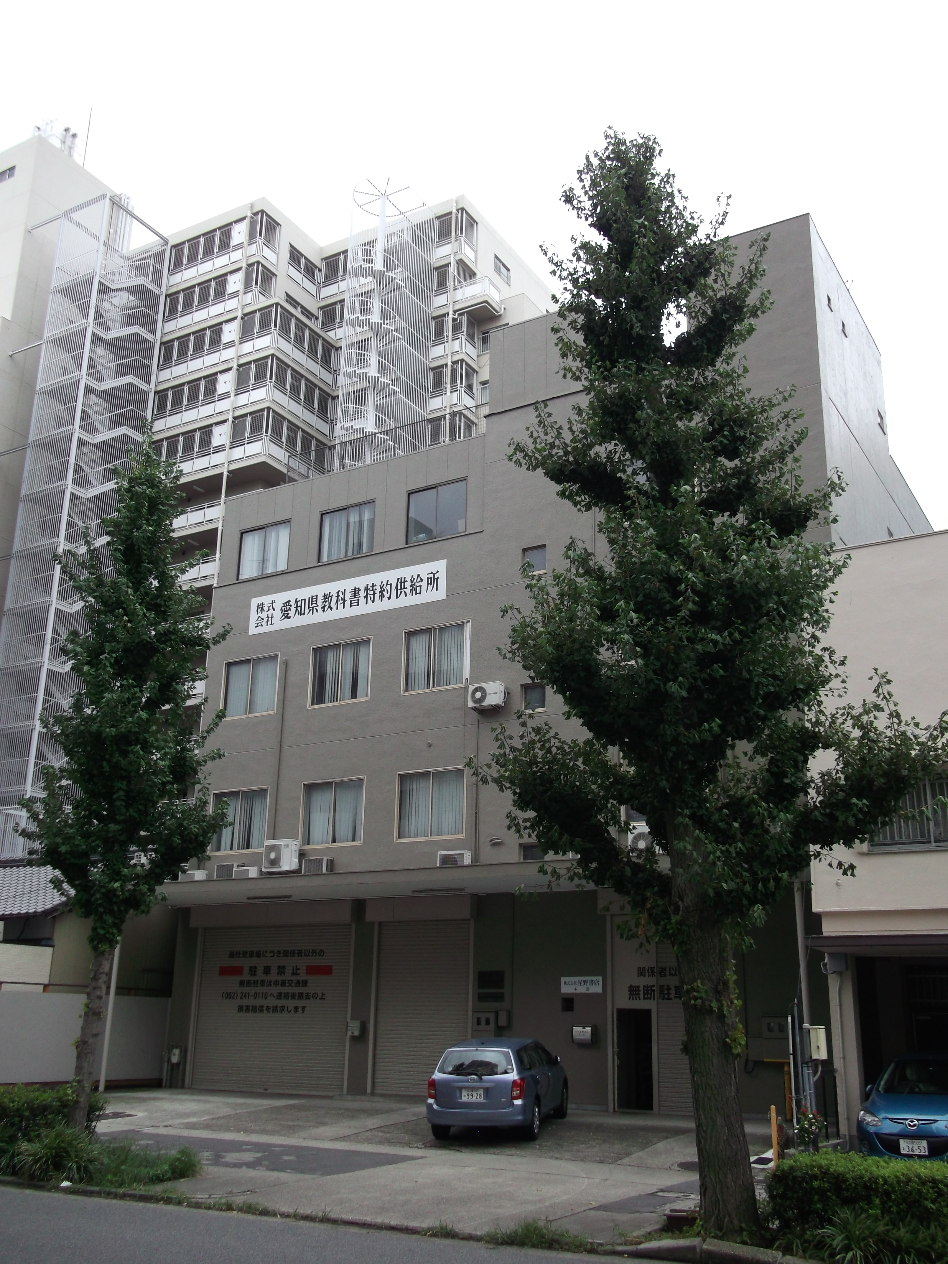 名古屋市中区丸の内の愛知県教科書特約供給所・星野書店本部を北側公道より撮影